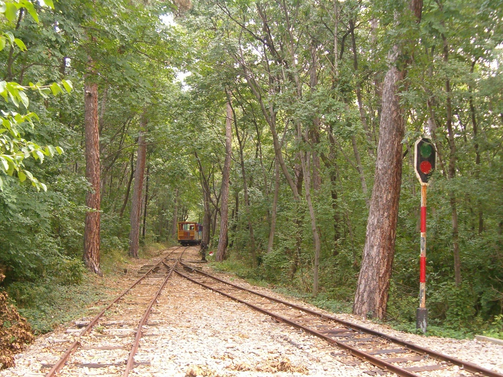 Mecsek Kisvasút, Pécs, Hungary